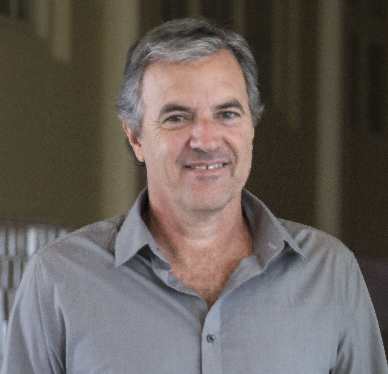 Buenos Aires, 18 de marzo de 2017 - Entrevista a Javier Frana en el Museo de los Inmigrantes.